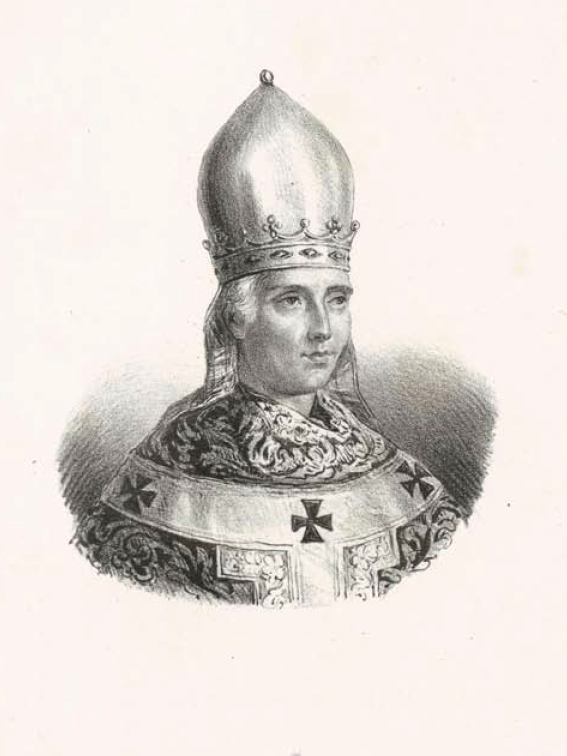 Dal Dizionario biografico degli uomini illustri di Sardegna di Pasquale Tola, 1837